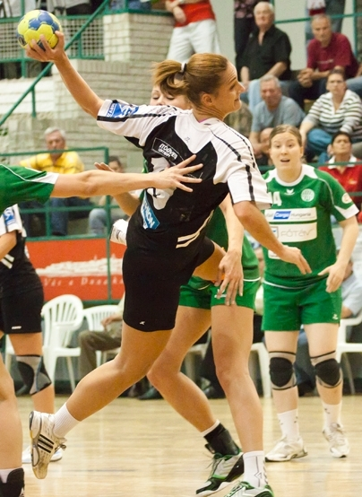 Viktória Rédei Soós